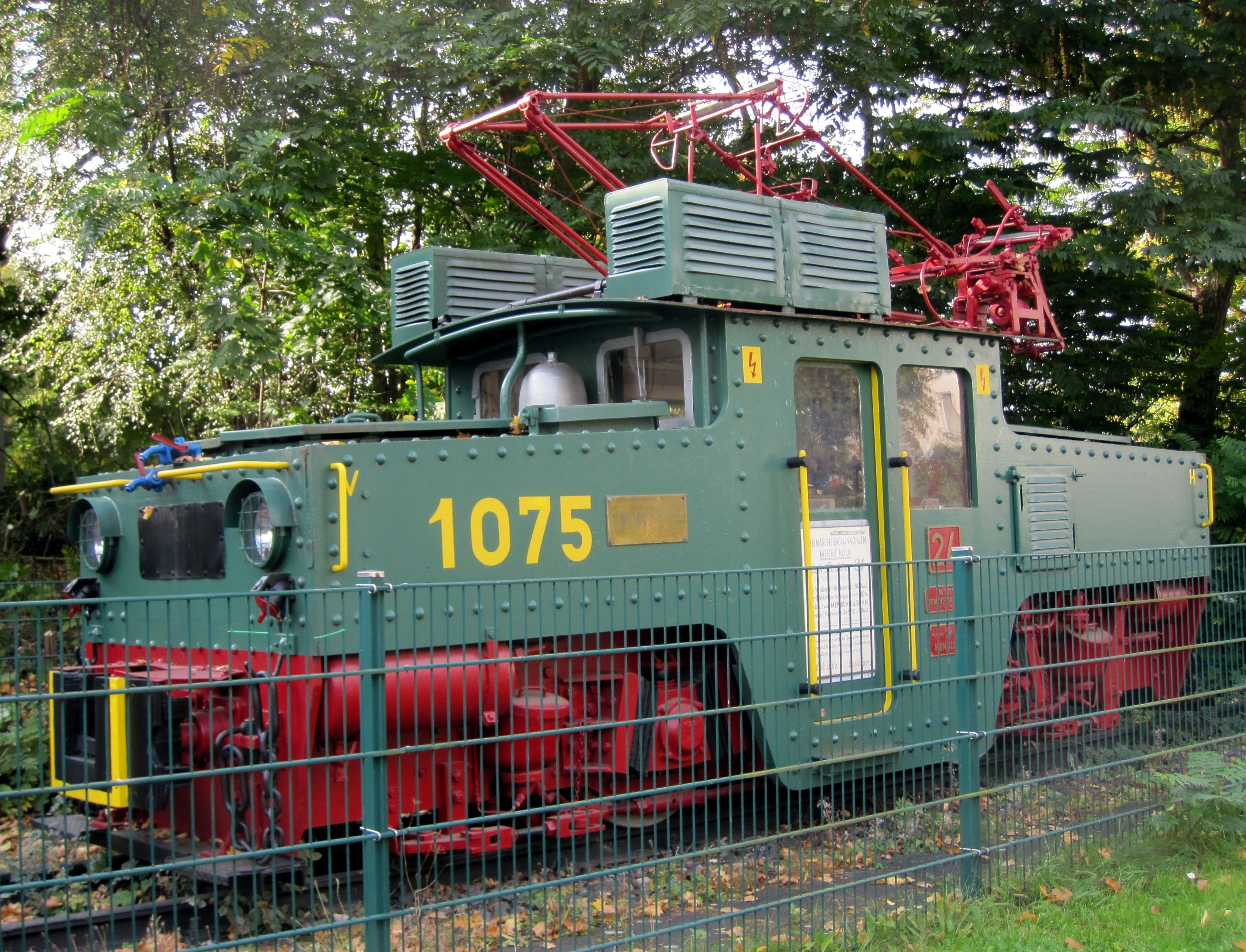 Liblar Lokomotive der Roddergrube Standort: Theodor-Heuss-Straße in Liblar Henschel E 24579, Baujahr 1940.